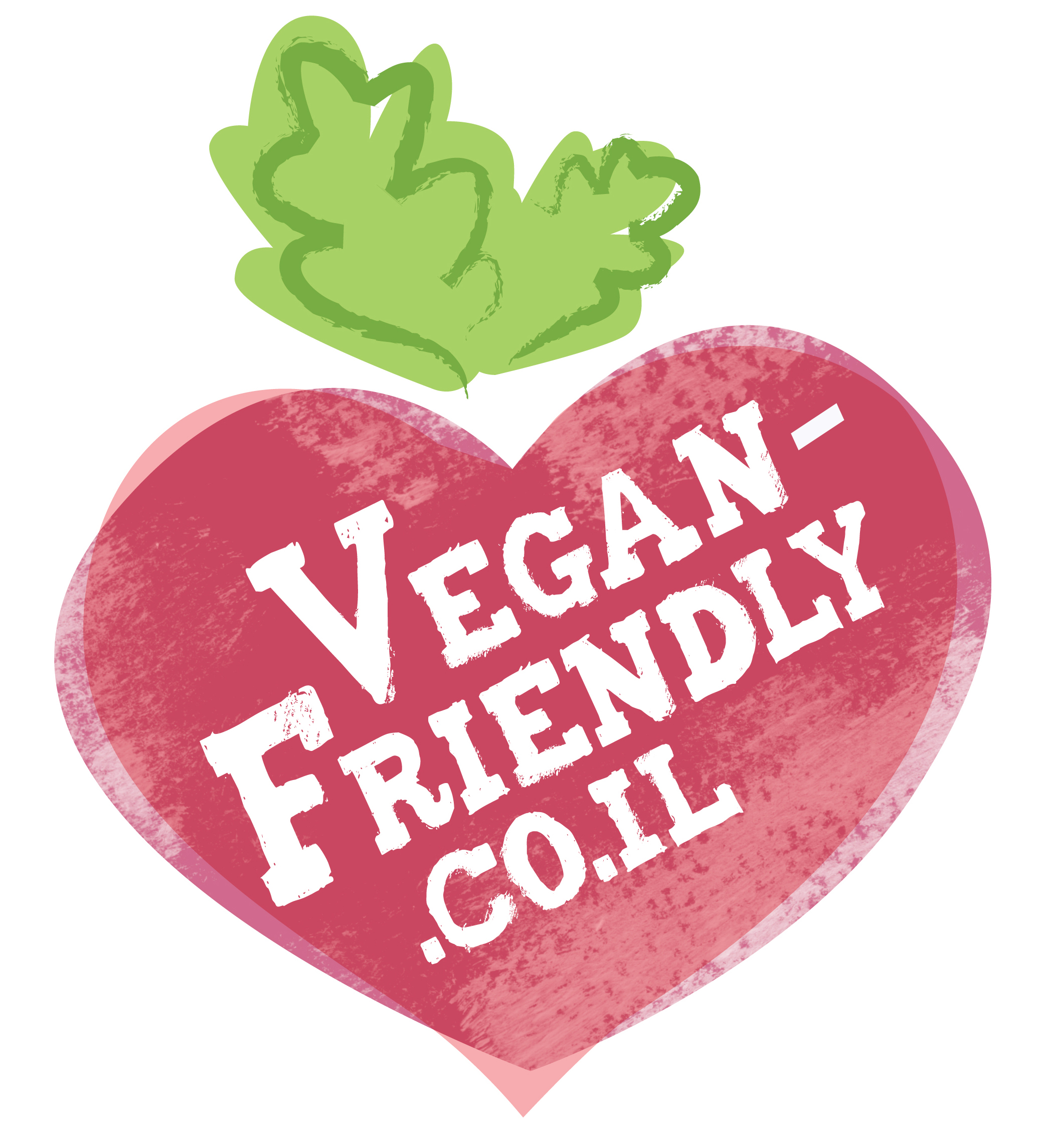 vegan friendly logo